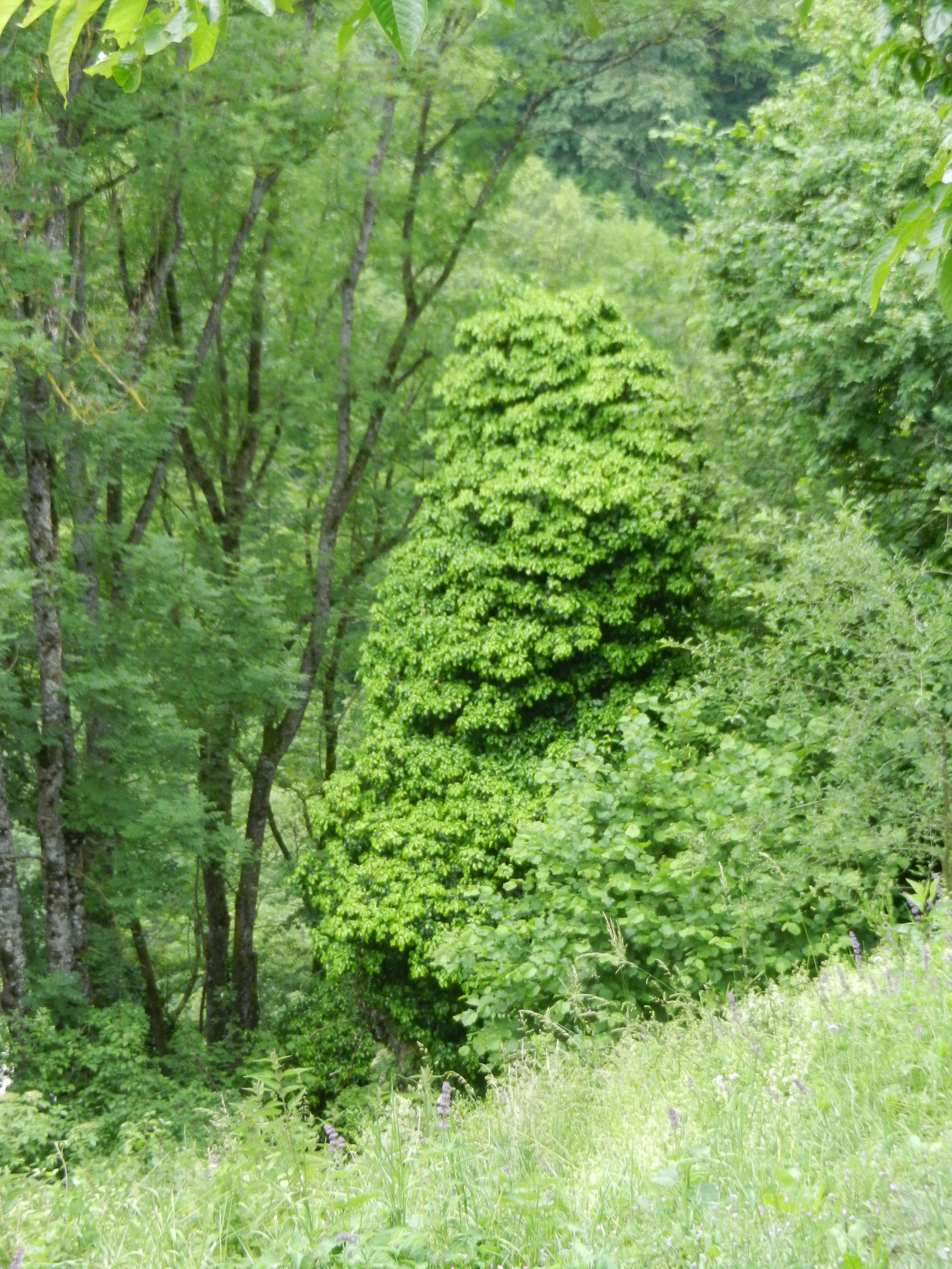 Ajdovska žena, skalni osamelec v celoti obraščen z bršljanom, Pilštanj, Kozjansko.